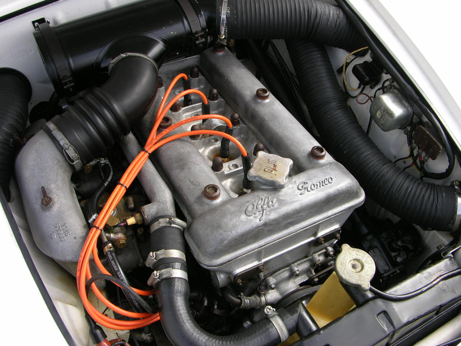 1956 Alfa Romeo Giulietta Spider